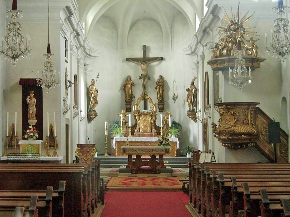 Innenansicht der Pfarrkirche Leopoldau, Wien